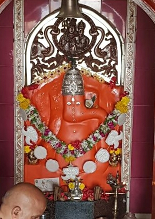 मश्रूम गणपती फोटो